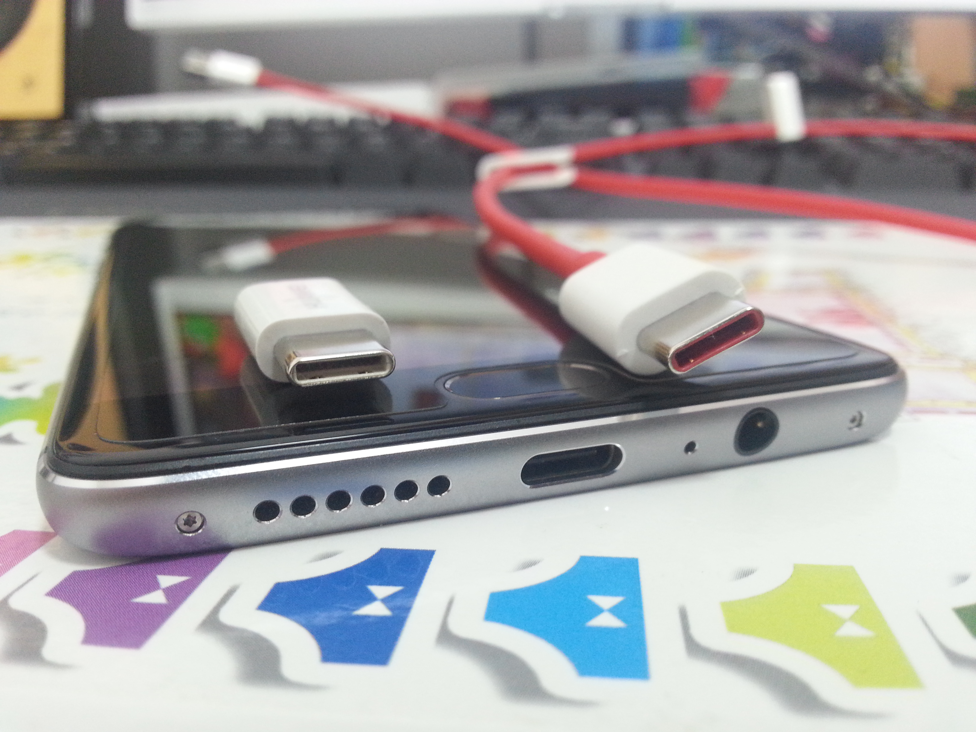 一加手機3之USB Type-C連接埠以及USB線纜。手機左上方的是一只USB Micro B to Type-C轉換器（非官方附送，華為出品）。